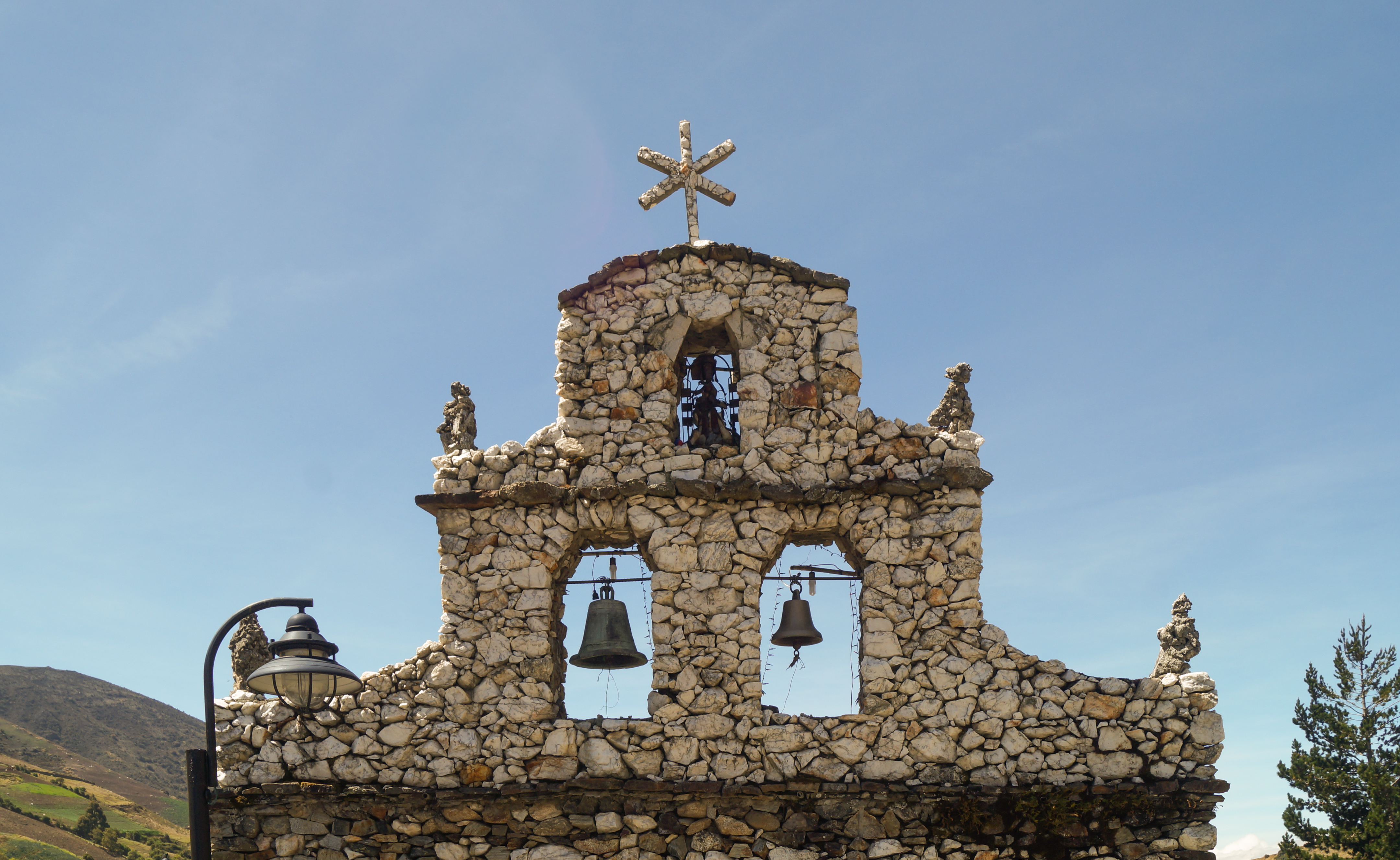 Se encuentra en San Rafael de Mucuchíes, construida por Juan Félix Sánchez. Mérida. Venezuela.